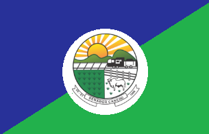 Bandeira de Senador Canedo, município de Goiás, Brasil.